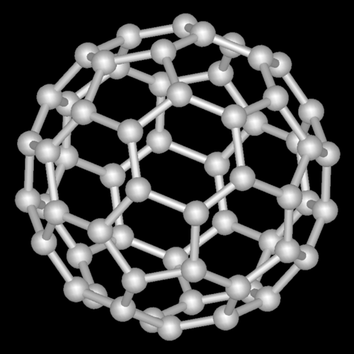 Fullereno C60